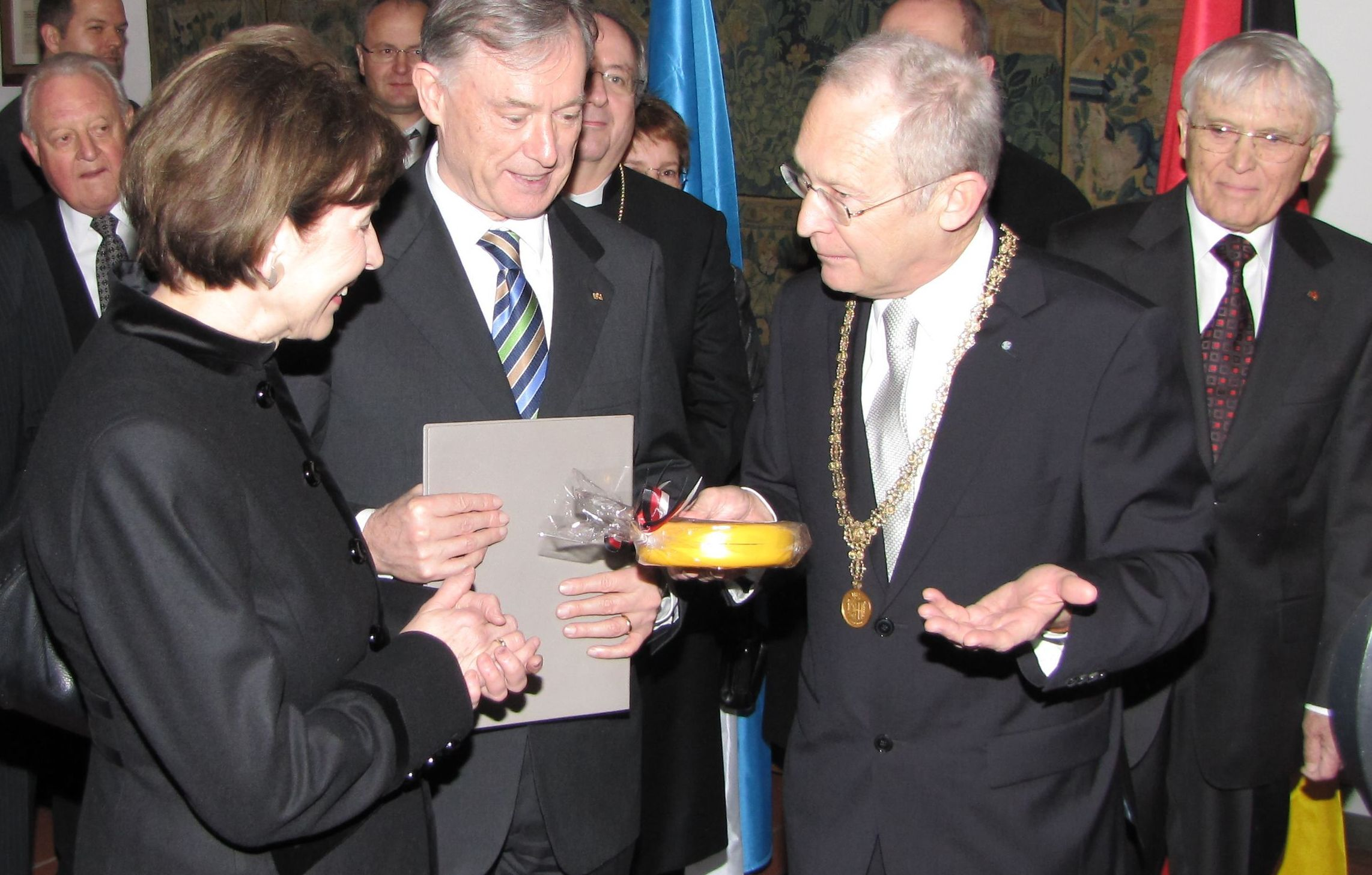 Marie-Luise Köhler, Horst Köhler, Oberbürgermeister Dr. Ivo Holzinger und Reiner Kunze beim Empfang anlässlich der Verleihung des Memminger Freiheitspreises 1525 im Memminger Rathaus